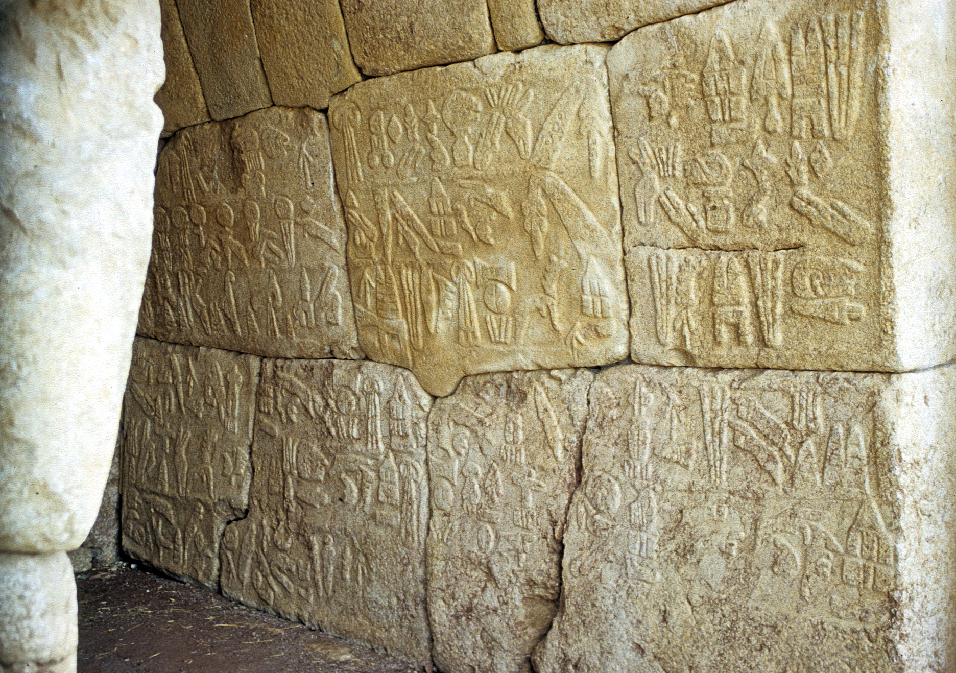 Hieroglyphenkammer in der Südburg, Ḫattuša, Zentraltürkei